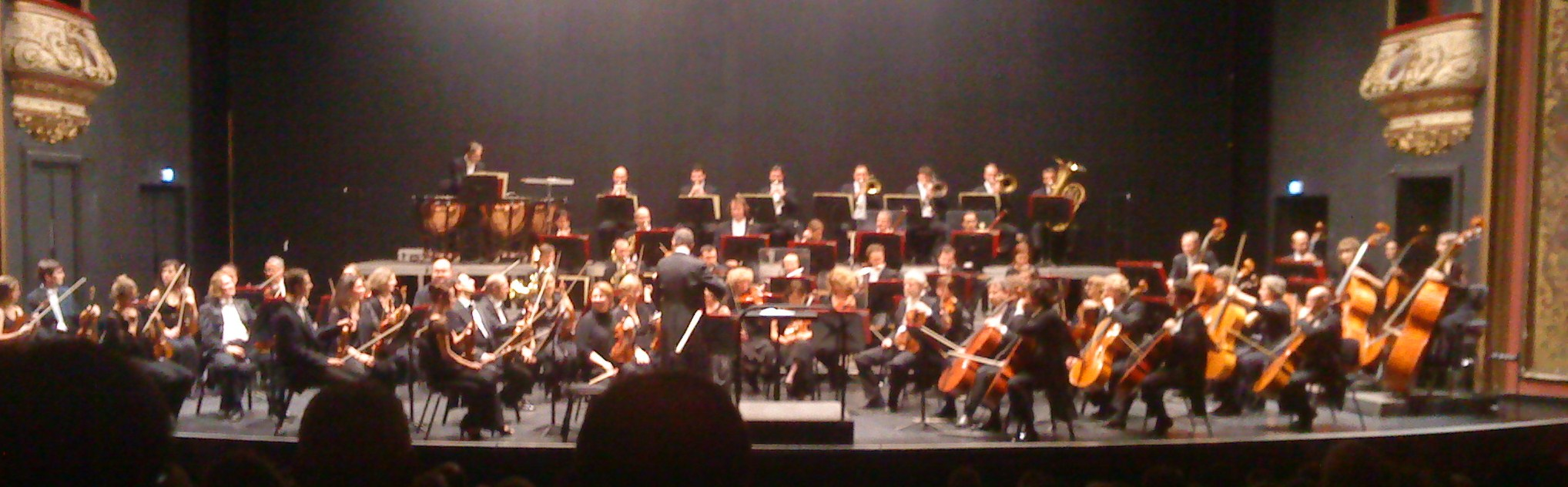 L'orchestre symphonique de Nancy avant une représentation à la salle Poirel le 7 janvier 2011.